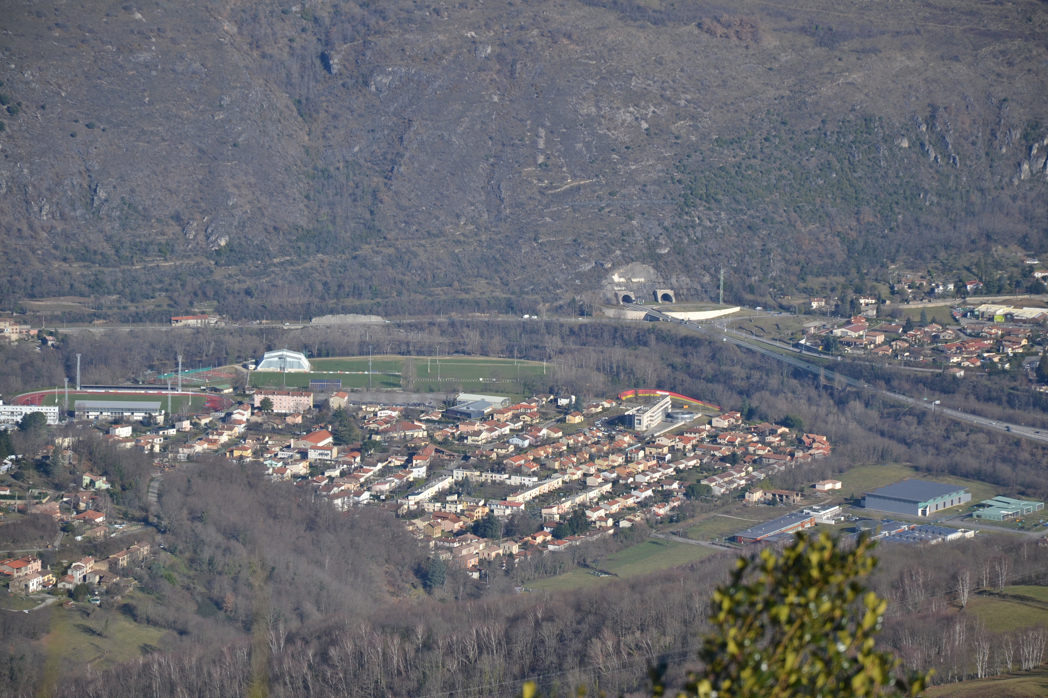 L'entrée sud du tunnel routier de Foix (Ariège, France), depuis le Prat de Redon.